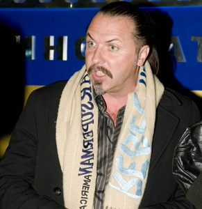 Юрий Грымов на премьере фильма «На игре»